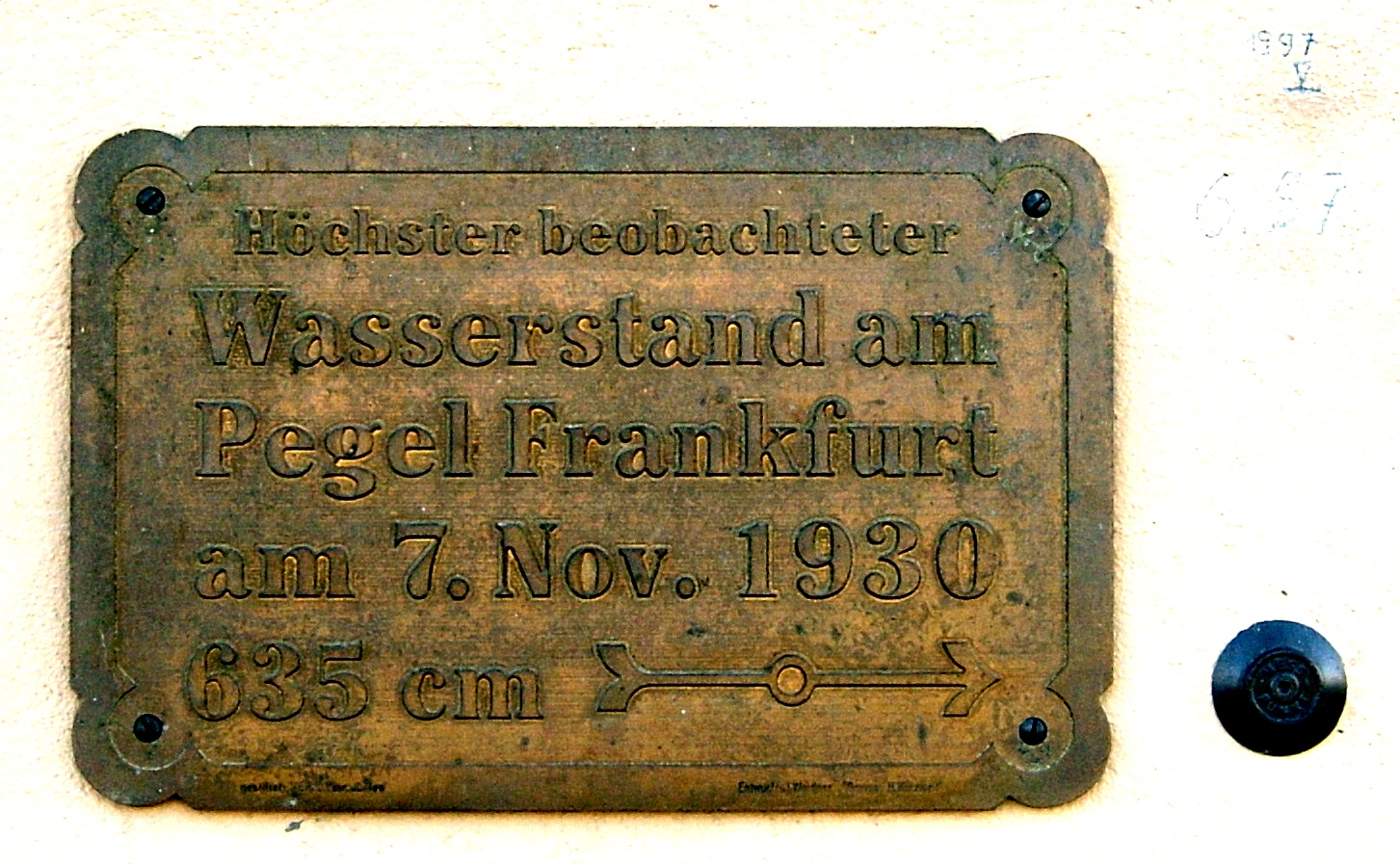 Pegelmarke in Frankfurt (Oder) an der Oderpromenade. Von Hand wurde der Höchstand 657 eingetragen. Nach Aussage des Wasser- und Schifffahrtsamts Eberswalde vom 2. August 2007 wurde 1997 als erster Wert 657 cm angegeben. Dieser Wert musste später auf Grund von vermessungstechnischen Anpassungen an ein durchgeführtes Hauptnivellement auf 656 korrigiert werden.